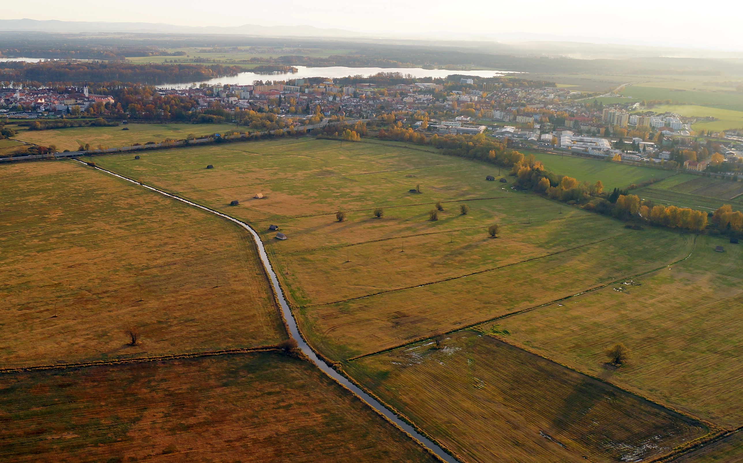 Seník - soubor seníků (Třeboň), louky směrem na Jindřichův Hradec, Třeboň